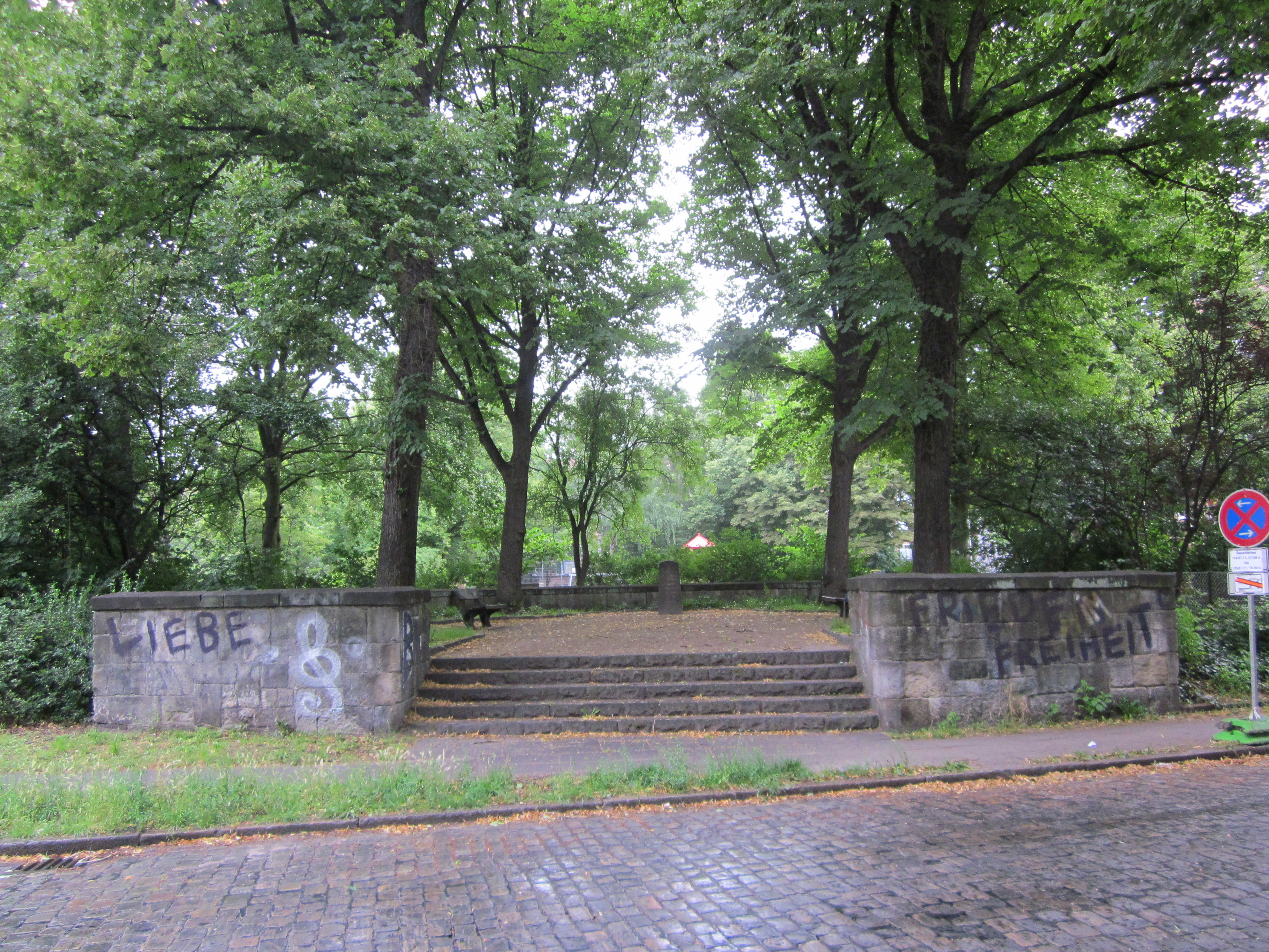 Der Gedenkstein für die Weihnachten 1813 von Marschall Davout aus der Stadt vertriebenen Hamburger, die in Barmbek starben und hier beerdigt wurden, wurde 1817 am heutigen Kraepelinweg aufgestellt. Er trägt die Inschrift "Begräbnisplatz der einheimischen Barmbeker und der vertriebenen Hamburger während der Belagerung Hamburgs im Jahre 1814".